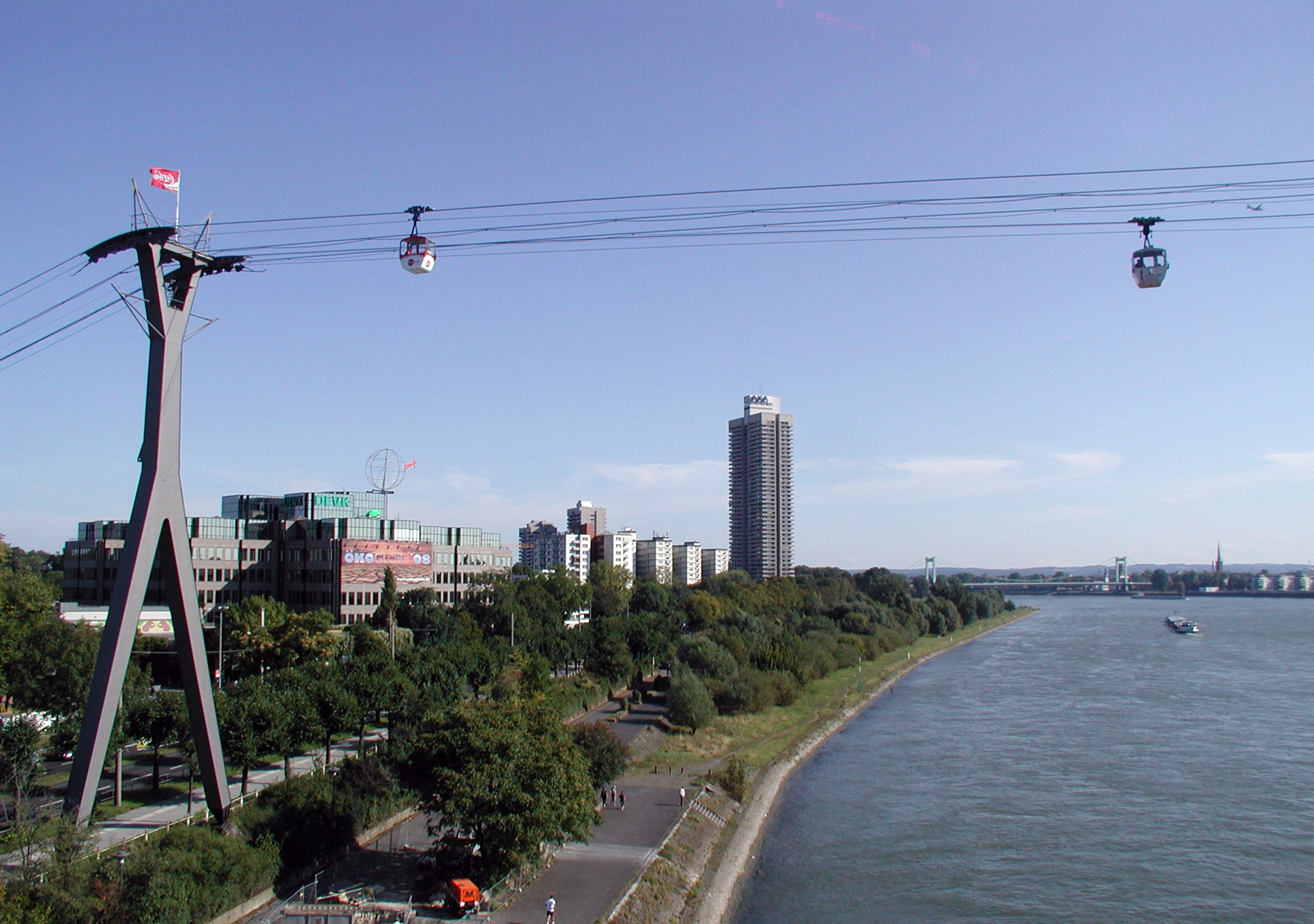 Köln, Blick zur "Riehler Aue" nach Norden